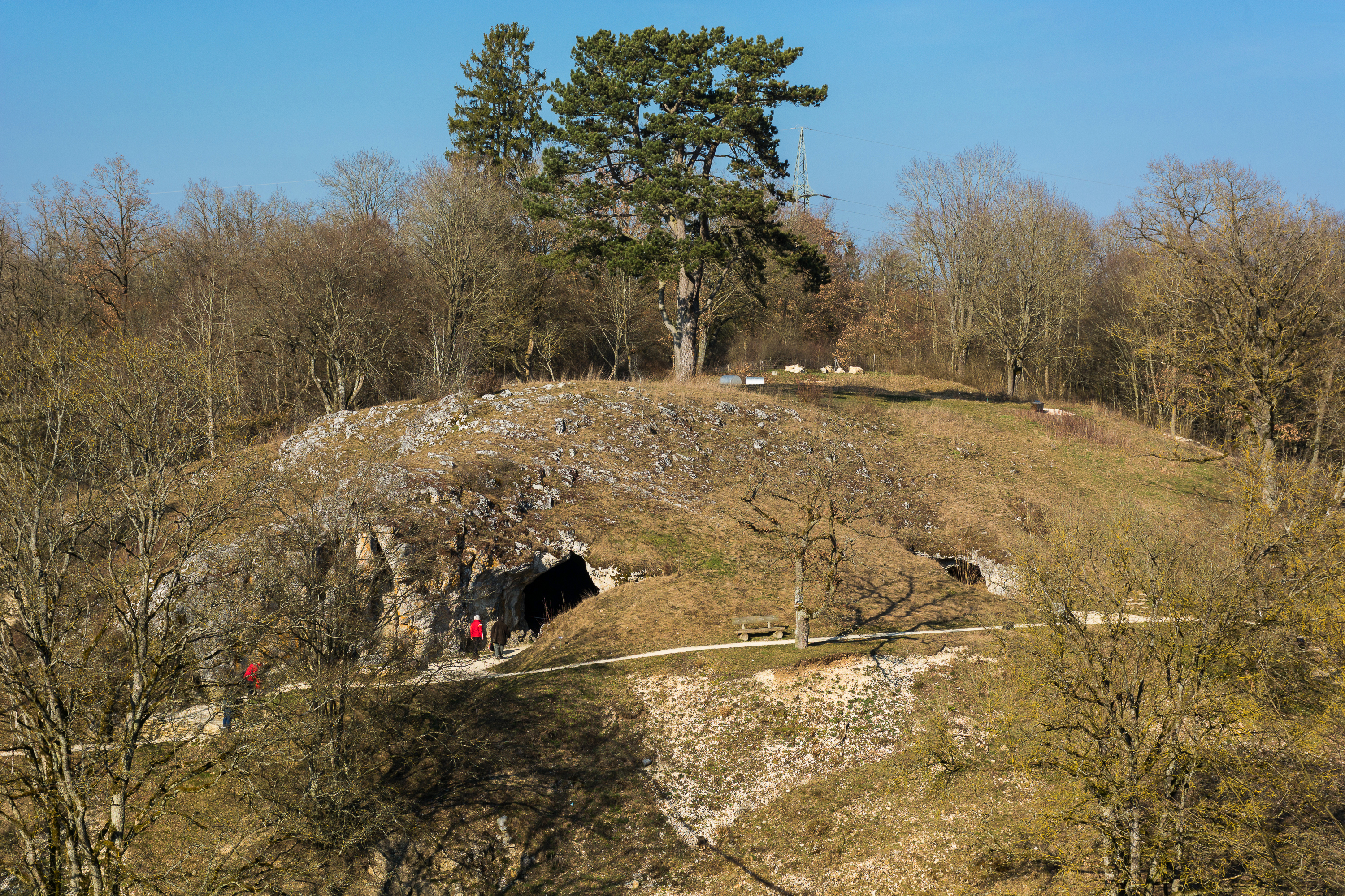 Die Vogelherdhöhle bei Stetten ob Lontal in Baden-Württemberg.